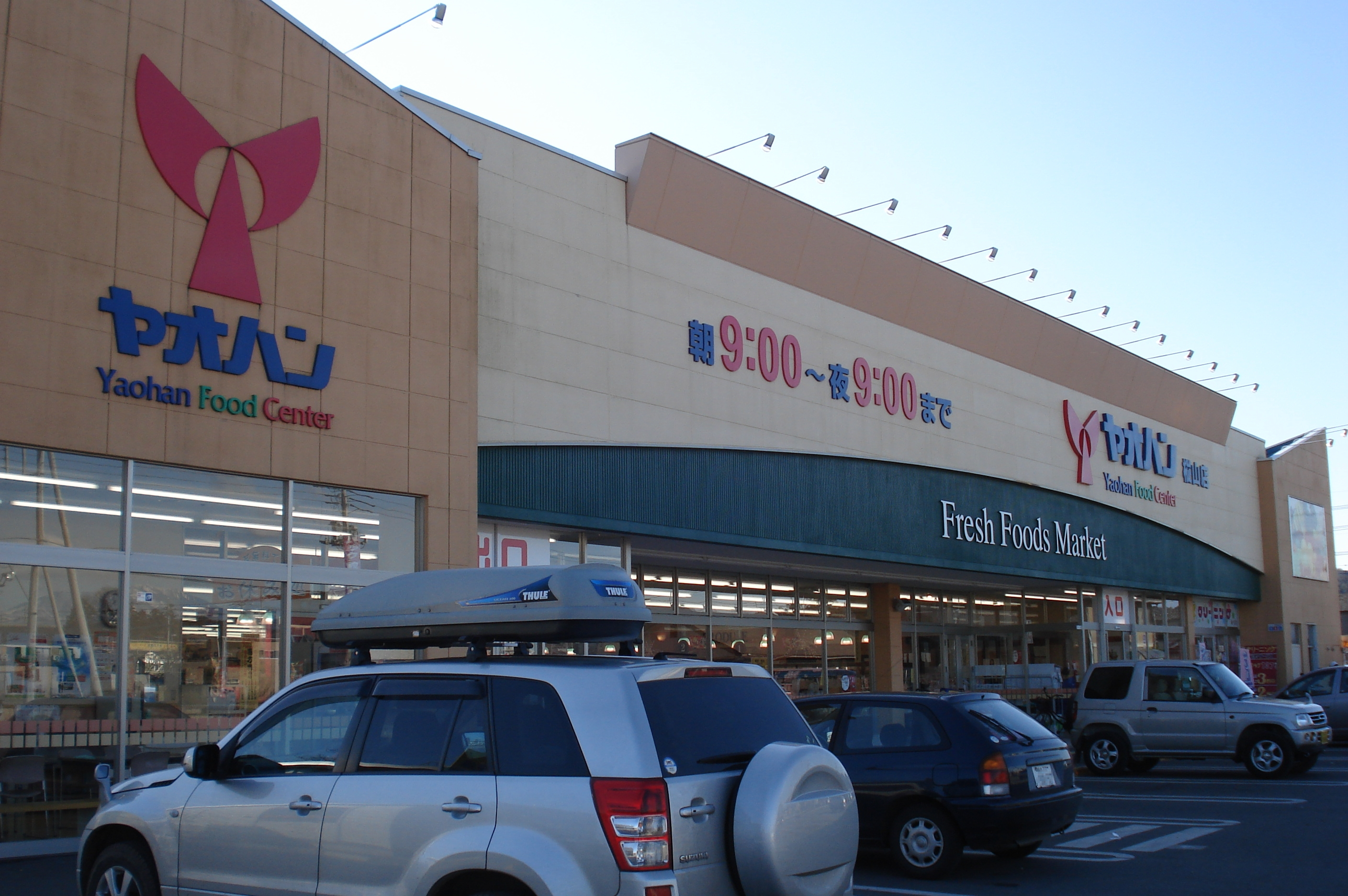 八百半フードセンター 樅山店 栃木県鹿沼市樅山町